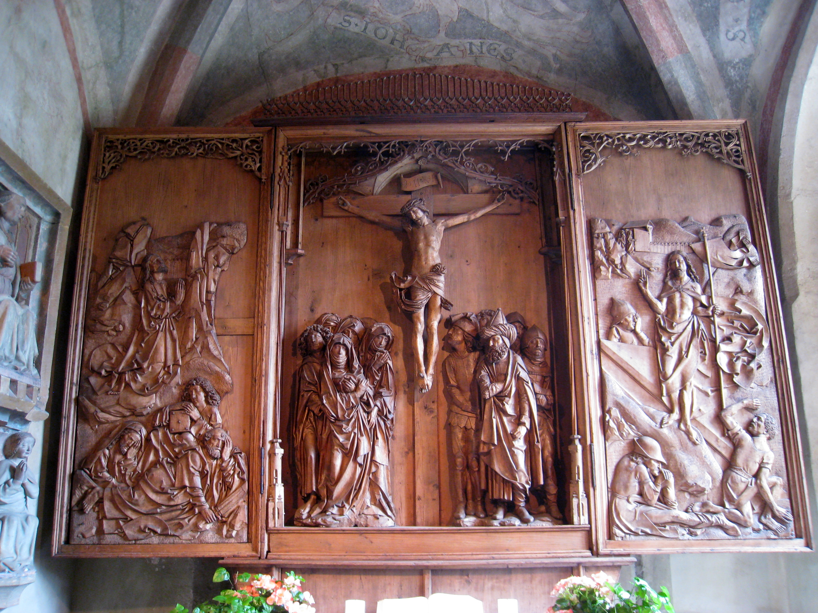 Altar - St. Peter und Paul church, Detwang, Rothenburg ob der Tauber, Germany.